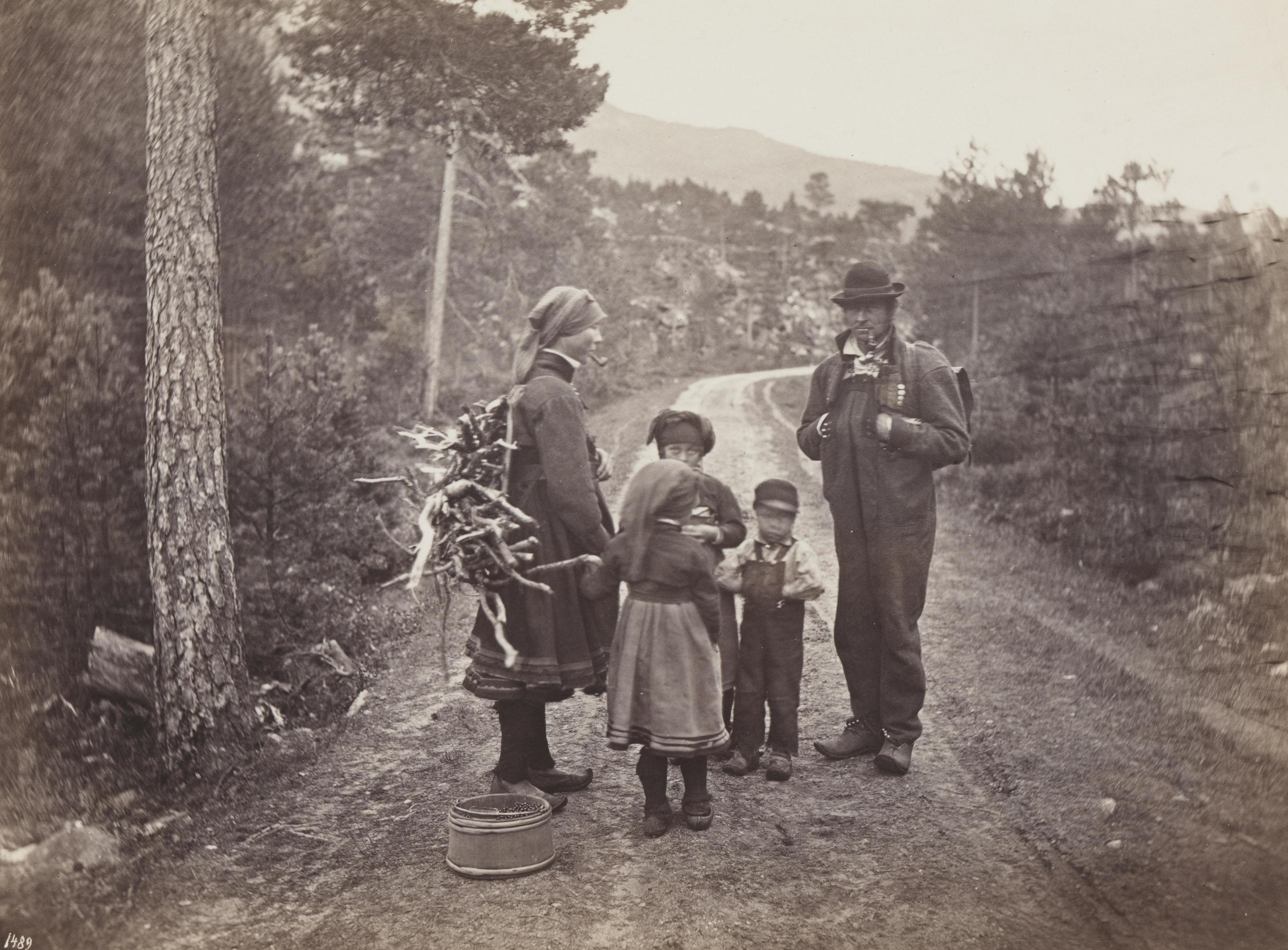 Bildet er hentet fra Nasjonalbibliotekets bildesamling Aust